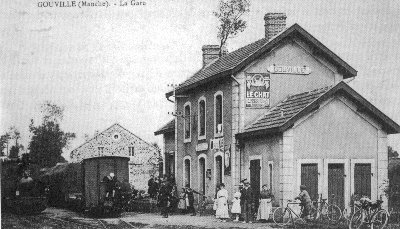 La gare de Gouville et, au fond, le Hangar ou 'Magasin' à varech